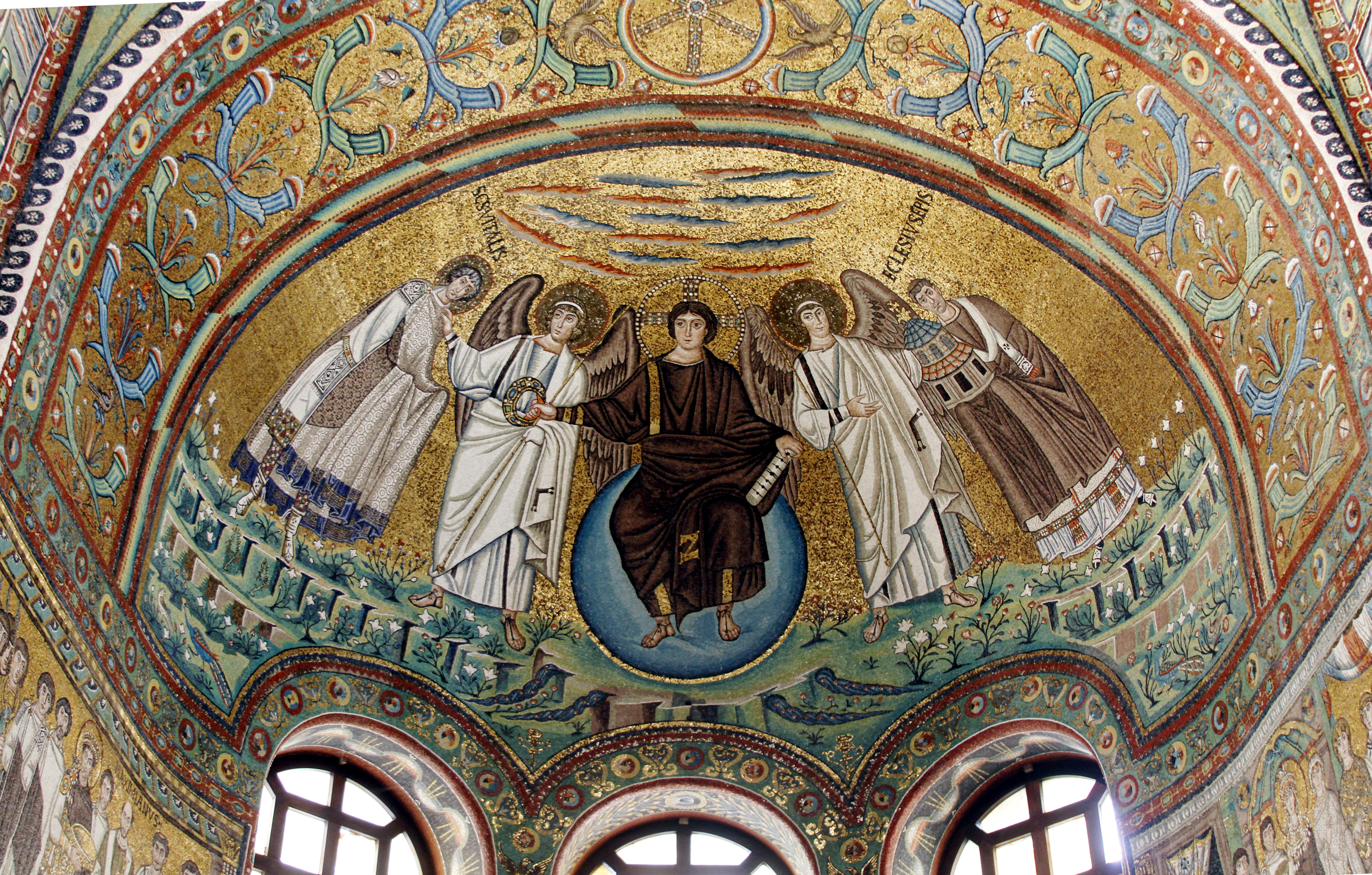 San Vitale - Ravenna